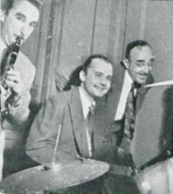 Jorge Guinle toca jazz com o grupo Hot Club em recepção oferecida às cover-girls Edith Luce e Gayle Mellot em sua residência no Rio de Janeiro.